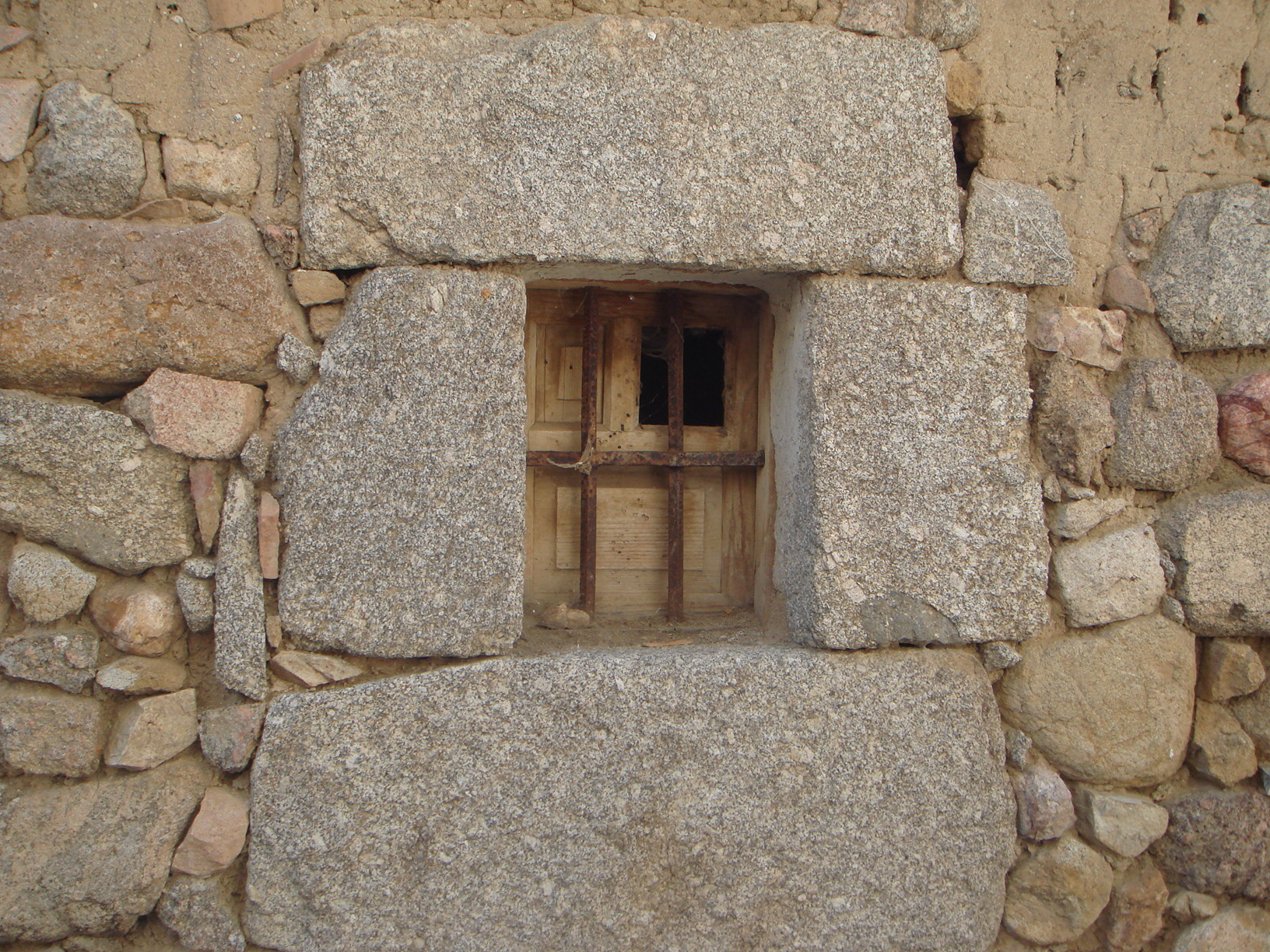 Ventanuco tradicional en la arquitectura popular, La Torre (Ávila), España.